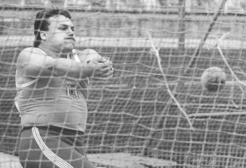 Gunther Rodehau ADN-ZB Thieme 3.8.85-wo-Dresden: Leichtathletik-Sportfest- Bei den Leichtathletik-Wettbewerben um das "Goldene Oval" erreichte der 26jährige Gunther Rodehau vom SC Einheit Dresden mit einer Weite von 82,64 Meter einen neuen DDR-Rekord. Er verbesserte die bisherige Bestmarke des Berliners Matthias Moder vom 11.6.85 um 1,72 Meter.